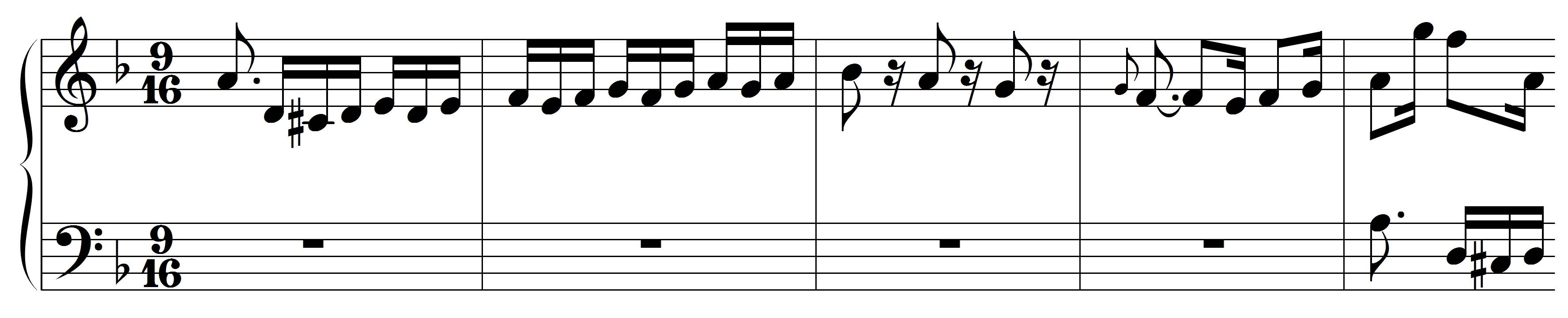 Bach, JS, Incipit Contrapunctus 15, BWV 1080